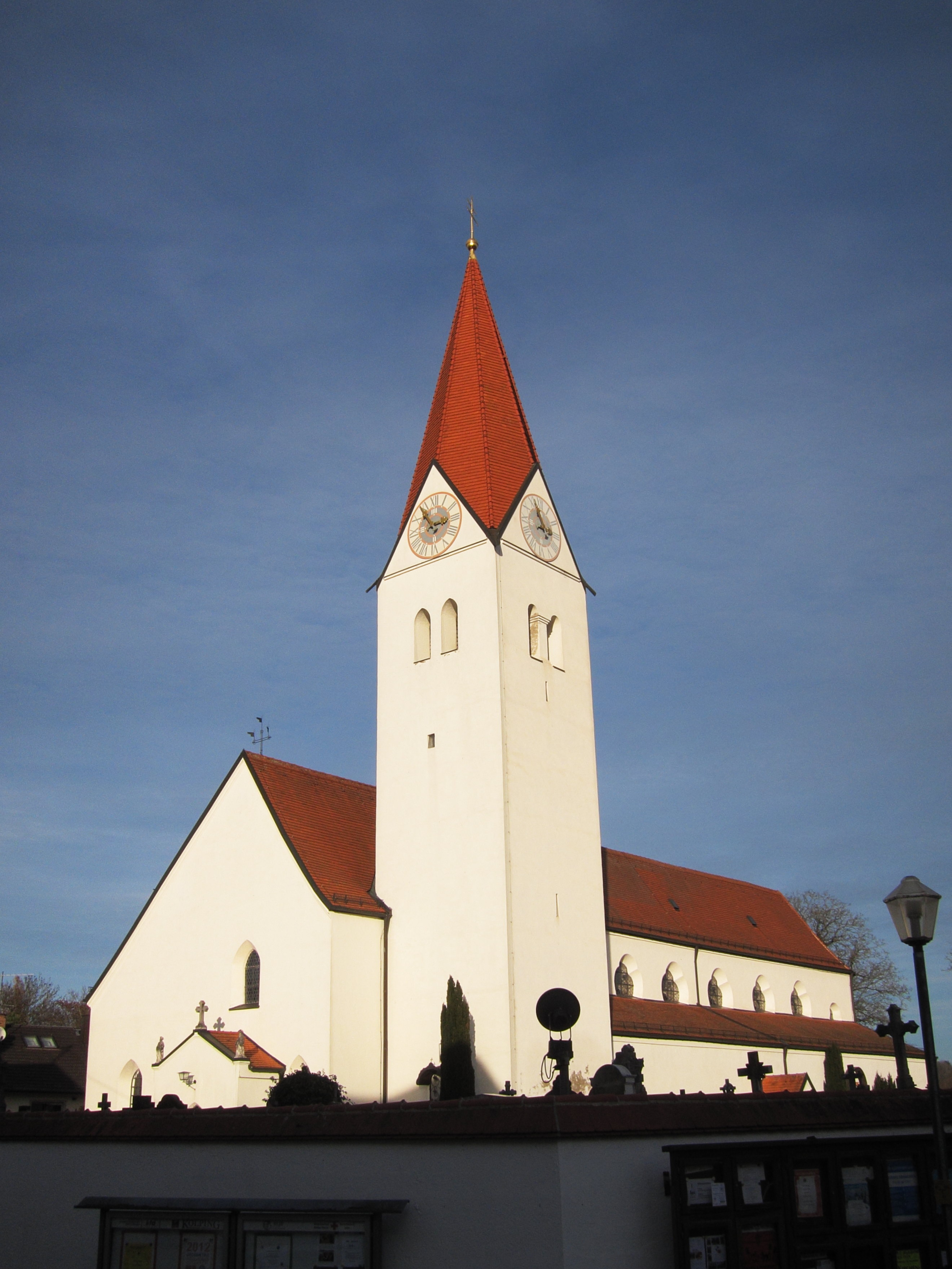 Ehemalige Kollegiatsstiftkirche, jetzt Katholische Pfarrkirche St. Zeno, dreischiffige Pfeilerbasilika mit Krypta und drei Apsiden nach dem Vorbild des Freisinger Domes um 1200 errichtet, Turm und westliche Vorhalle Anfang 15. Jahrhundert, Barockisierung 1697-1701 und um 1730; mit Ausstattung